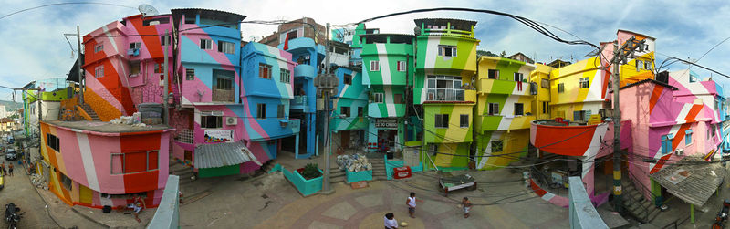 Foto panorâmica da Praça Cantão, situado na Favela Santa Marta, em Botafogo, Rio de Janeiro, Brasil. Esta foto foi tirada para ser incorporada ao site e disponibilizada ao público sem restrições.